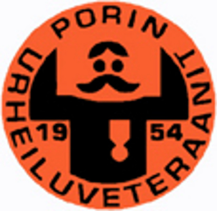 PUV logo